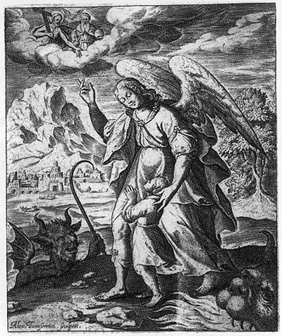 Анёл-ахоўнік. (з кнігі Жыціі святых з навукамі...)